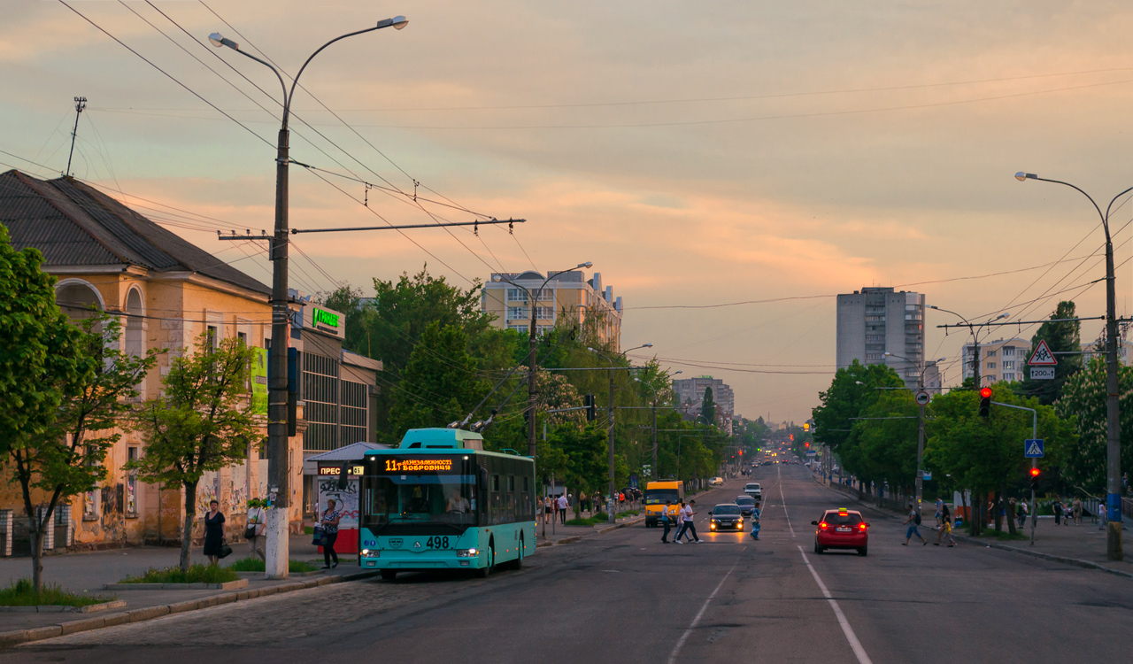 Еталон Т12110 «Барвінок» № 498